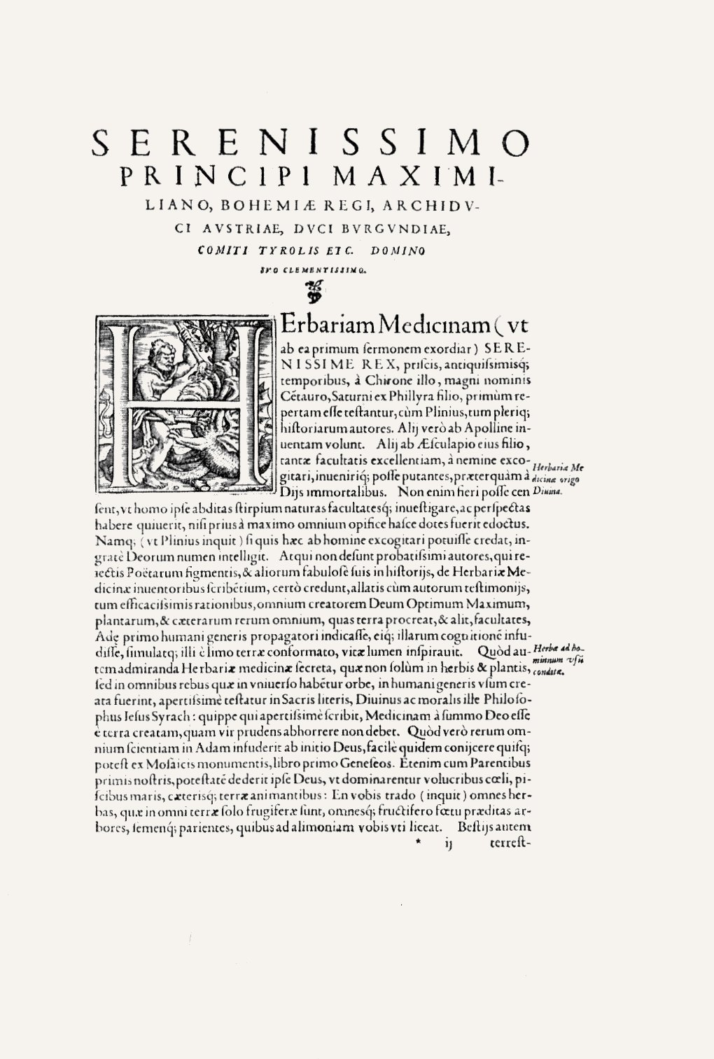 Matthioliho Epistolarum Medicinalium, textová strana s úvodním slovem